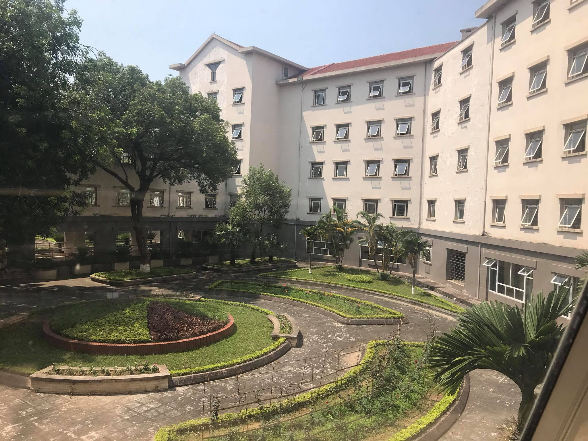 Hình ảnh sân trong của bệnh viện 74 Trung ương